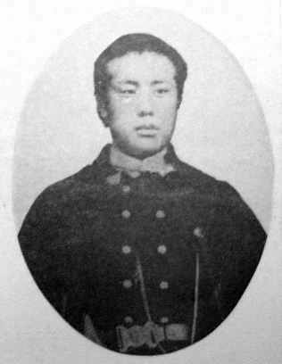 a Japanese man 人見勝太郎 (Katsutaro Hitomi)